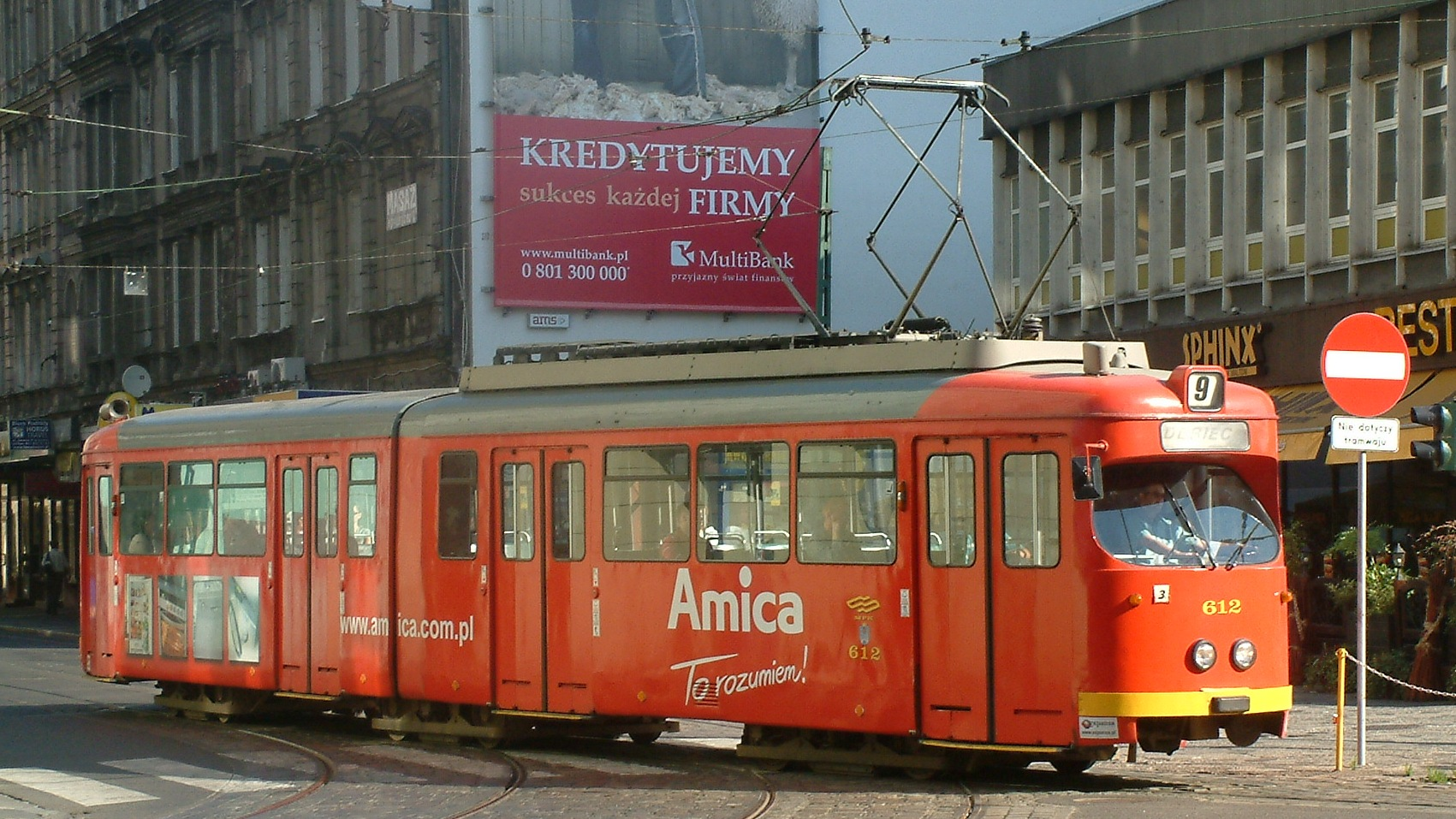 Düwag GT6 in Poznań